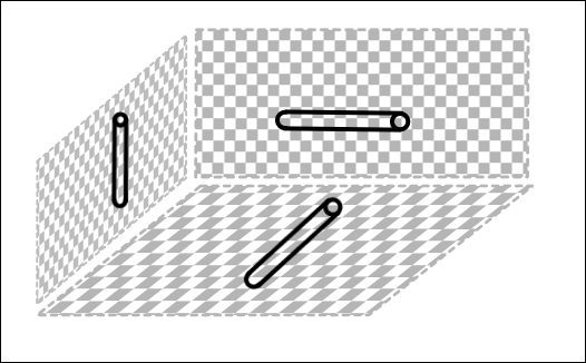 Configuration de trois magnéto-coupleurs dans les trois plans de l'espace.